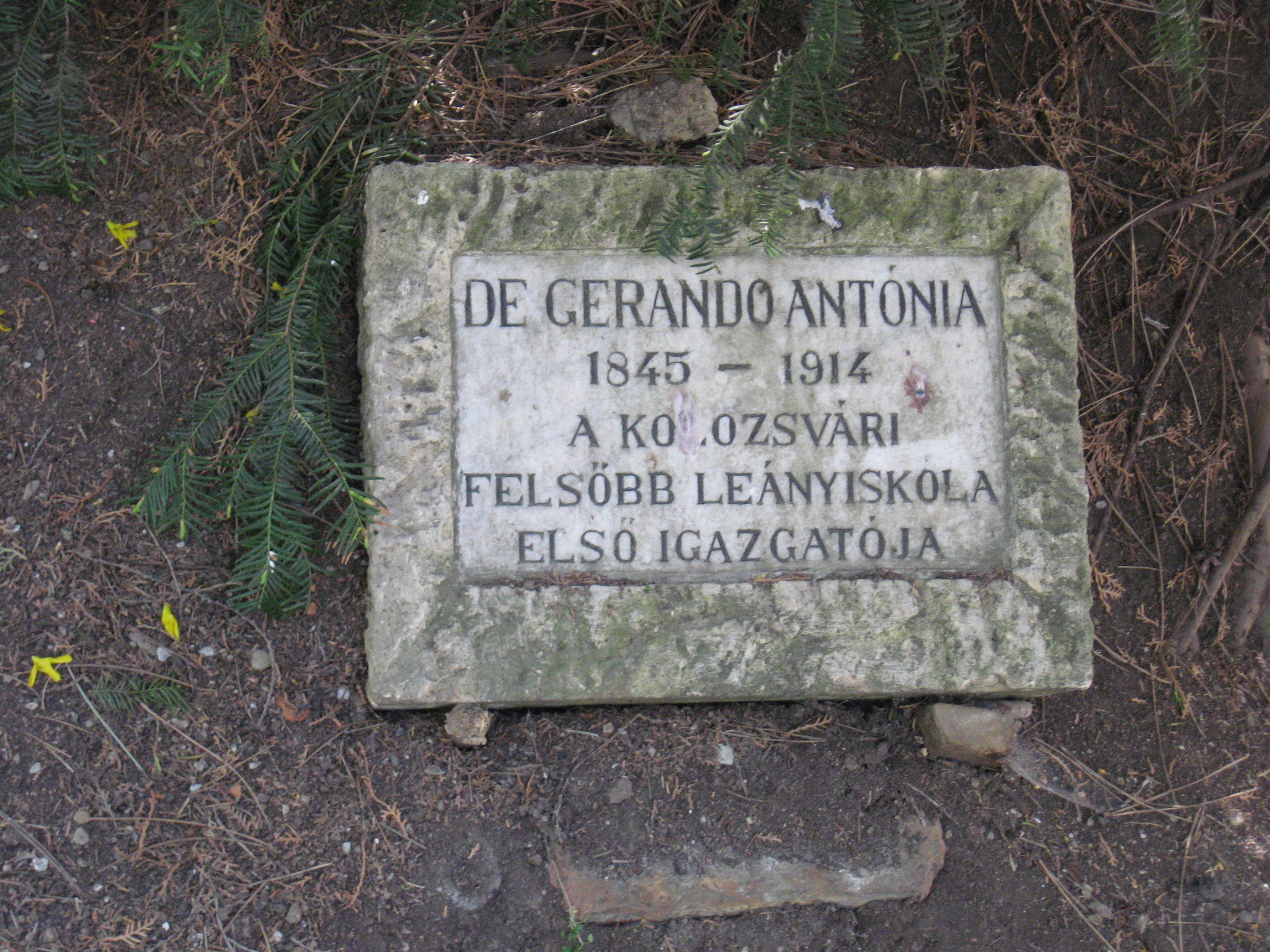 De Gerando Antonina régi sírköve a kolozsvári Házsongárdi temetőben.